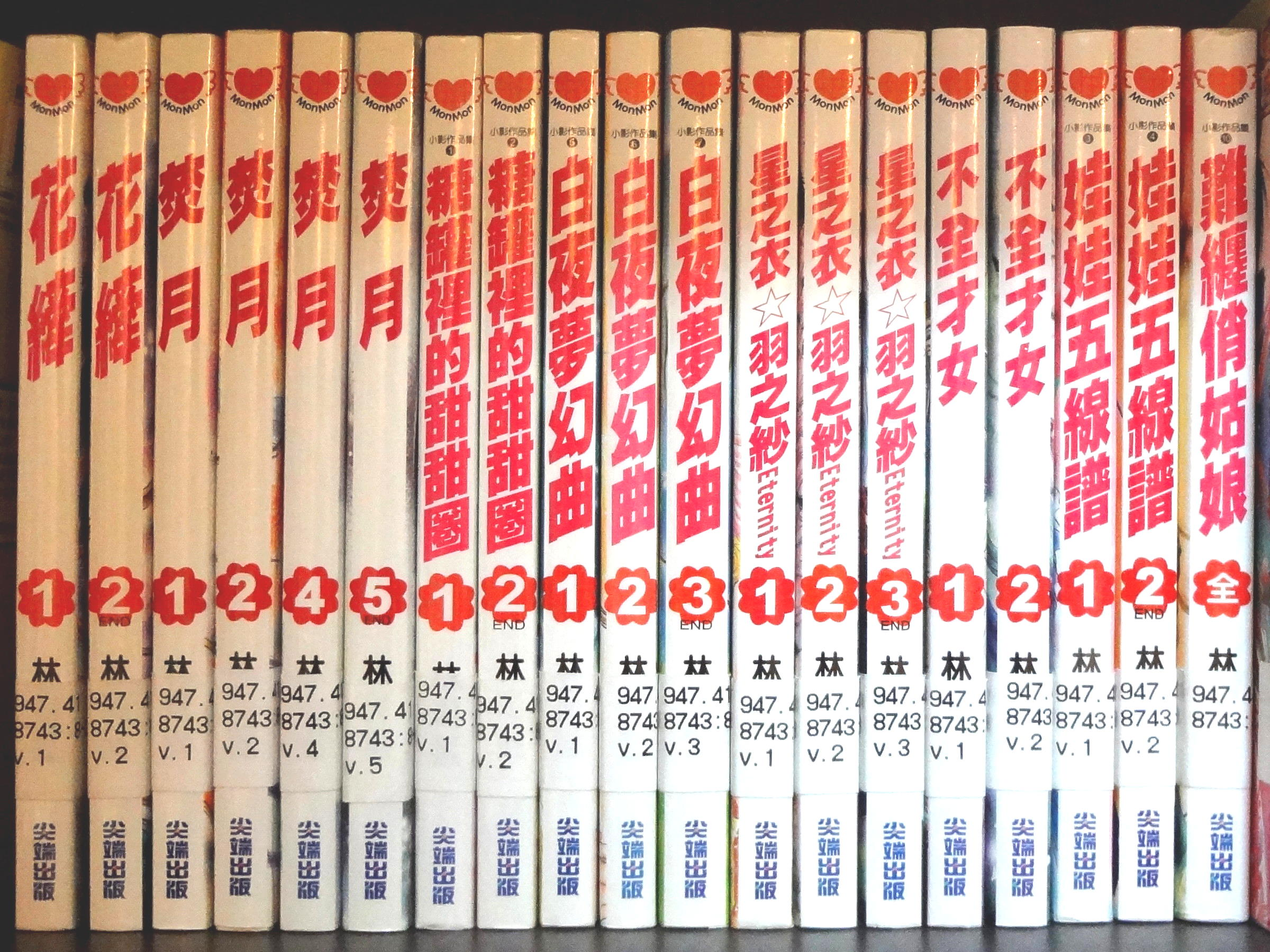 中華民國國家圖書館藝術暨視聽資料中心漫畫屋收藏的尖端出版林青慧漫畫作品單行本書背。